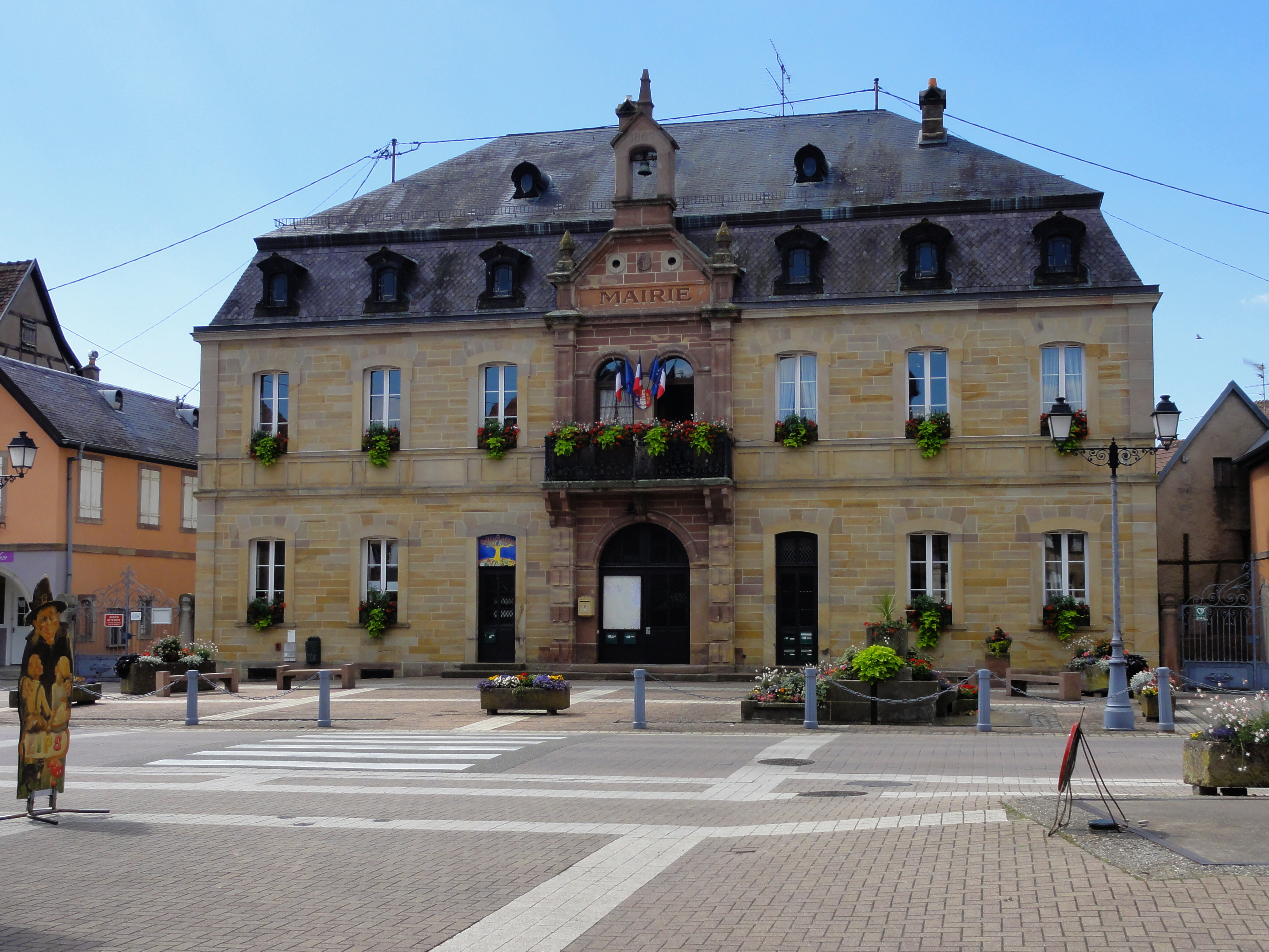 Alsace, Bas-Rhin, Gertwiller, Mairie (1869). .